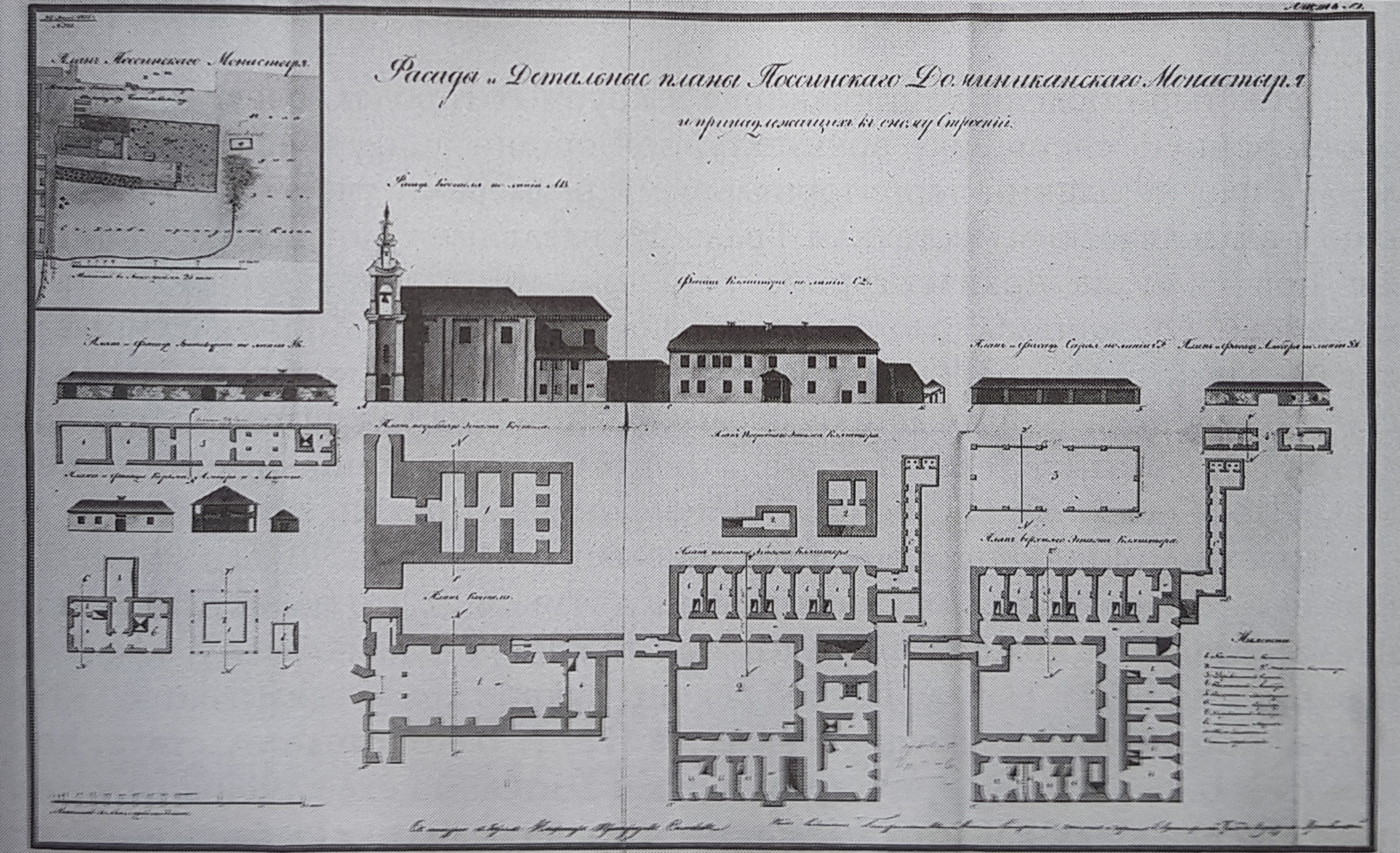 Беларуская (тарашкевіца): Пасінь (Pasiń). Касьцёл Сьвятога Дамініка і кляштар дамініканаў, абмеры